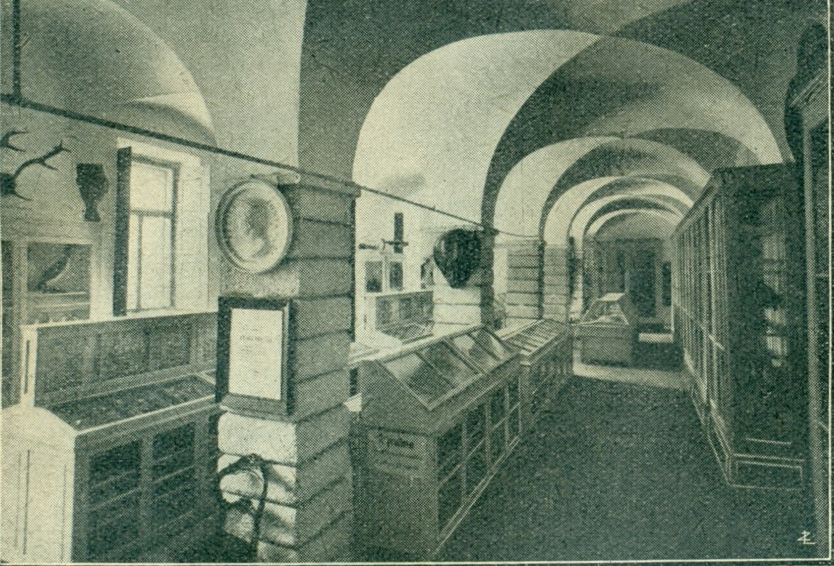 Museo civico di Rovereto negli anni 20 Palazzo Annona Foto originale anni 20 - biblioteca personale